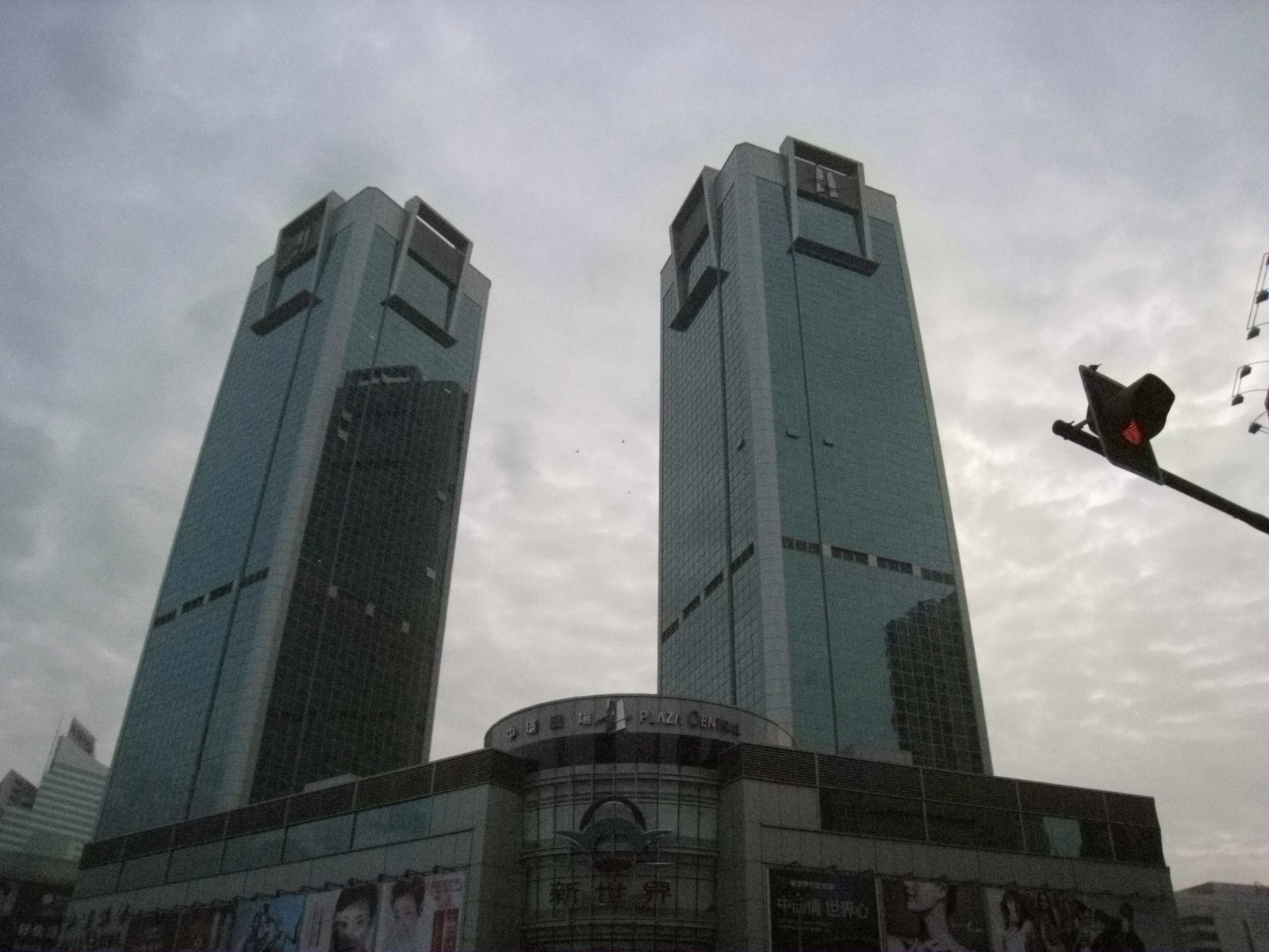 中环广场 Plaza Central